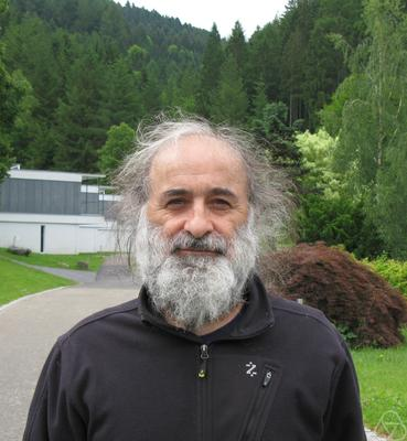 Foto di Selman Akbulut